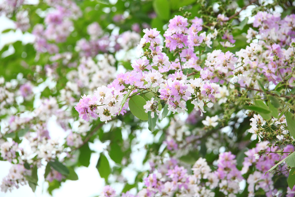 ดอกเสลา